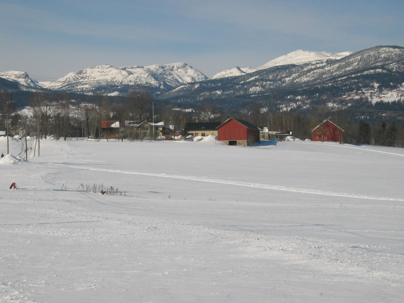 Fra Bø. Sisjord med Lifjell bak